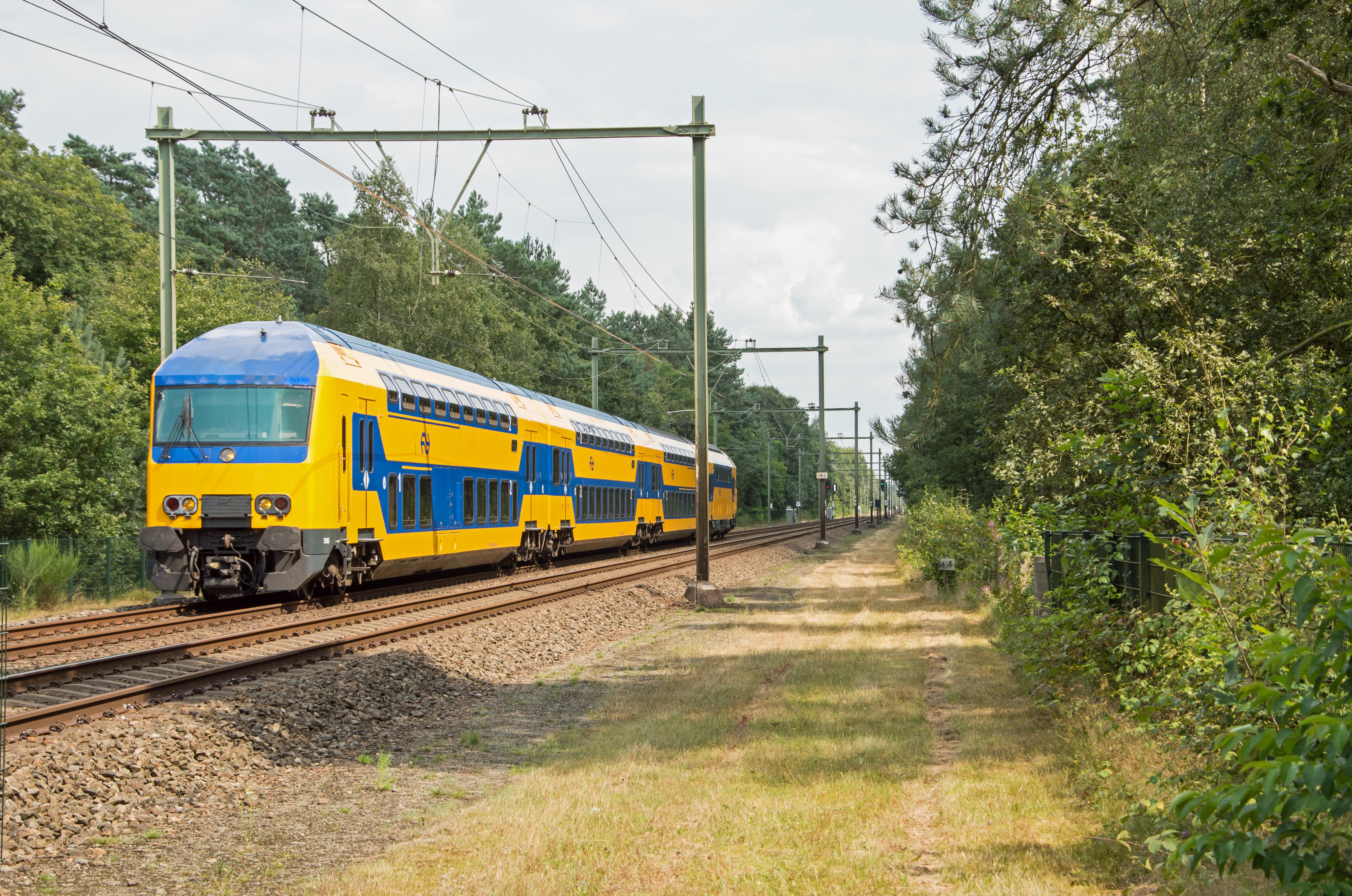 Soest DDZ 7505 als Sprinter Zwolle - Utrecht